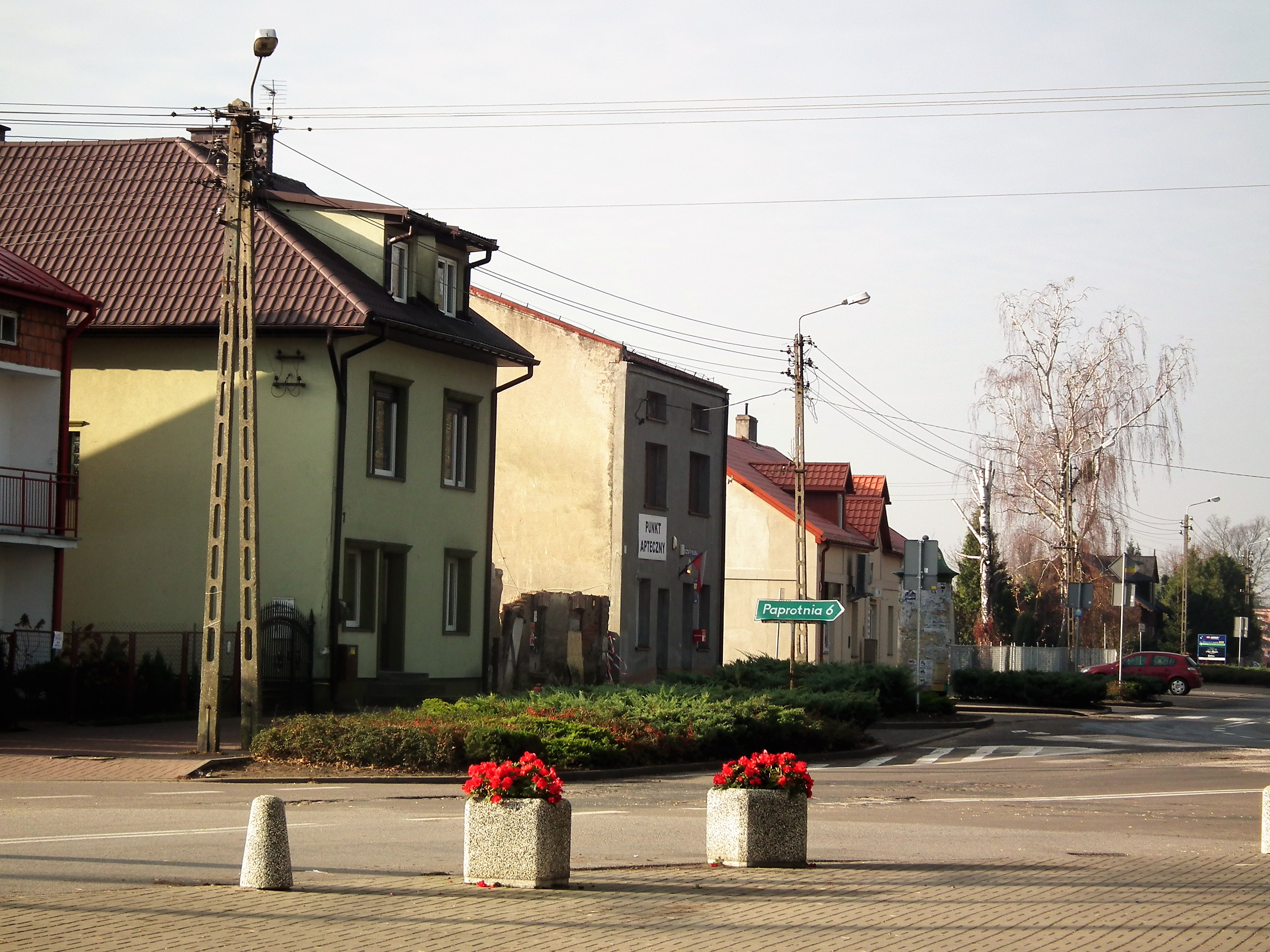 Centrum Szymanowa koło Sochaczewa.